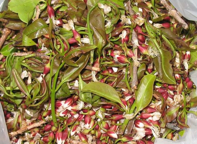 Cratoxylum formosum, fleurs vendues sur les marchés.